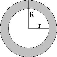 Koło zamachowe wydrążone.